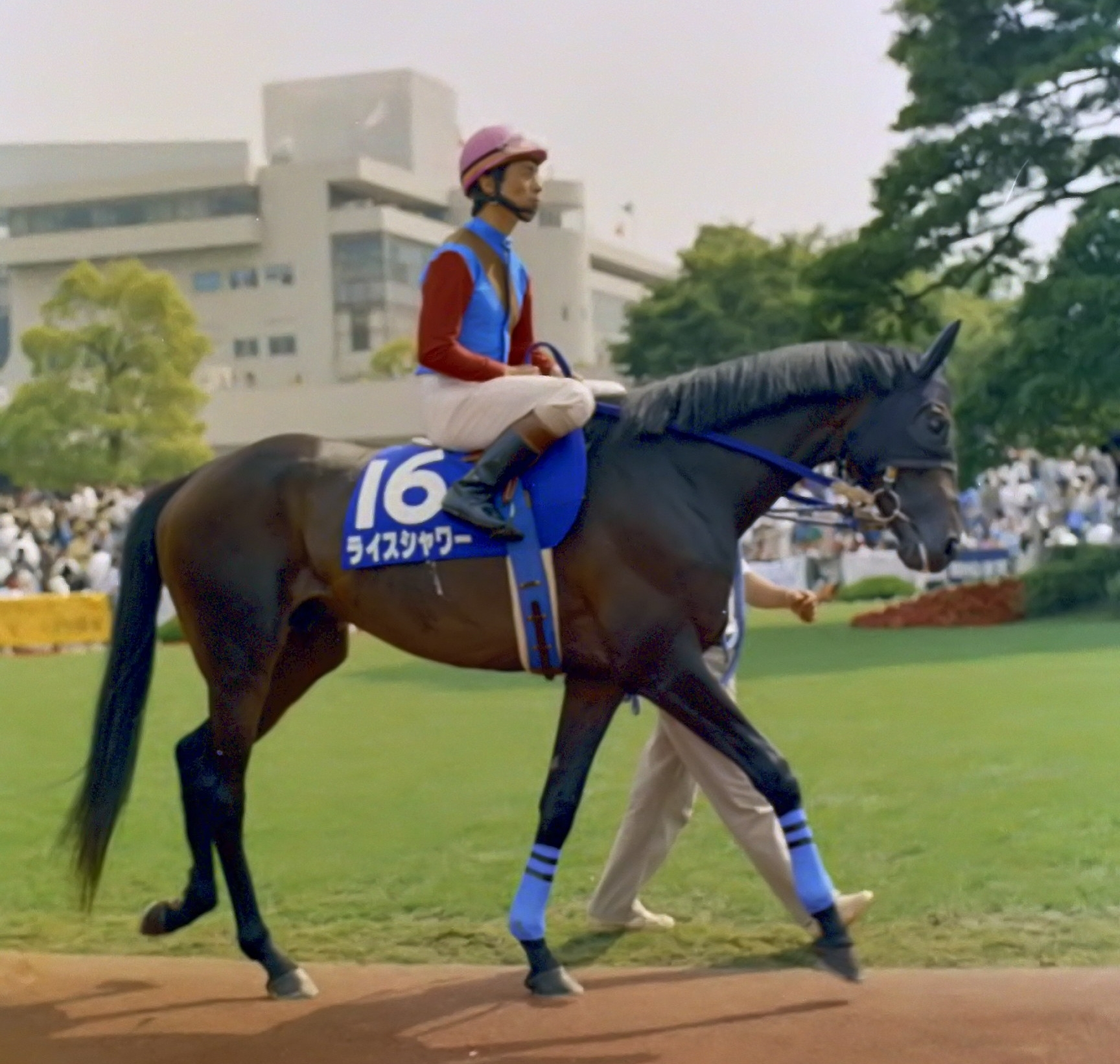 ライスシャワー 1995年6月4日 京都競馬場